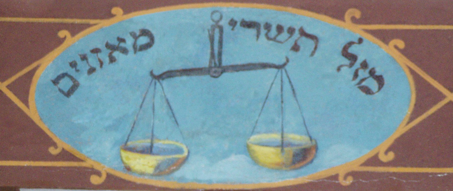 Znaki zodiaku na belkowaniu galerii dla kobiet synagogi Kupa w Krakowie